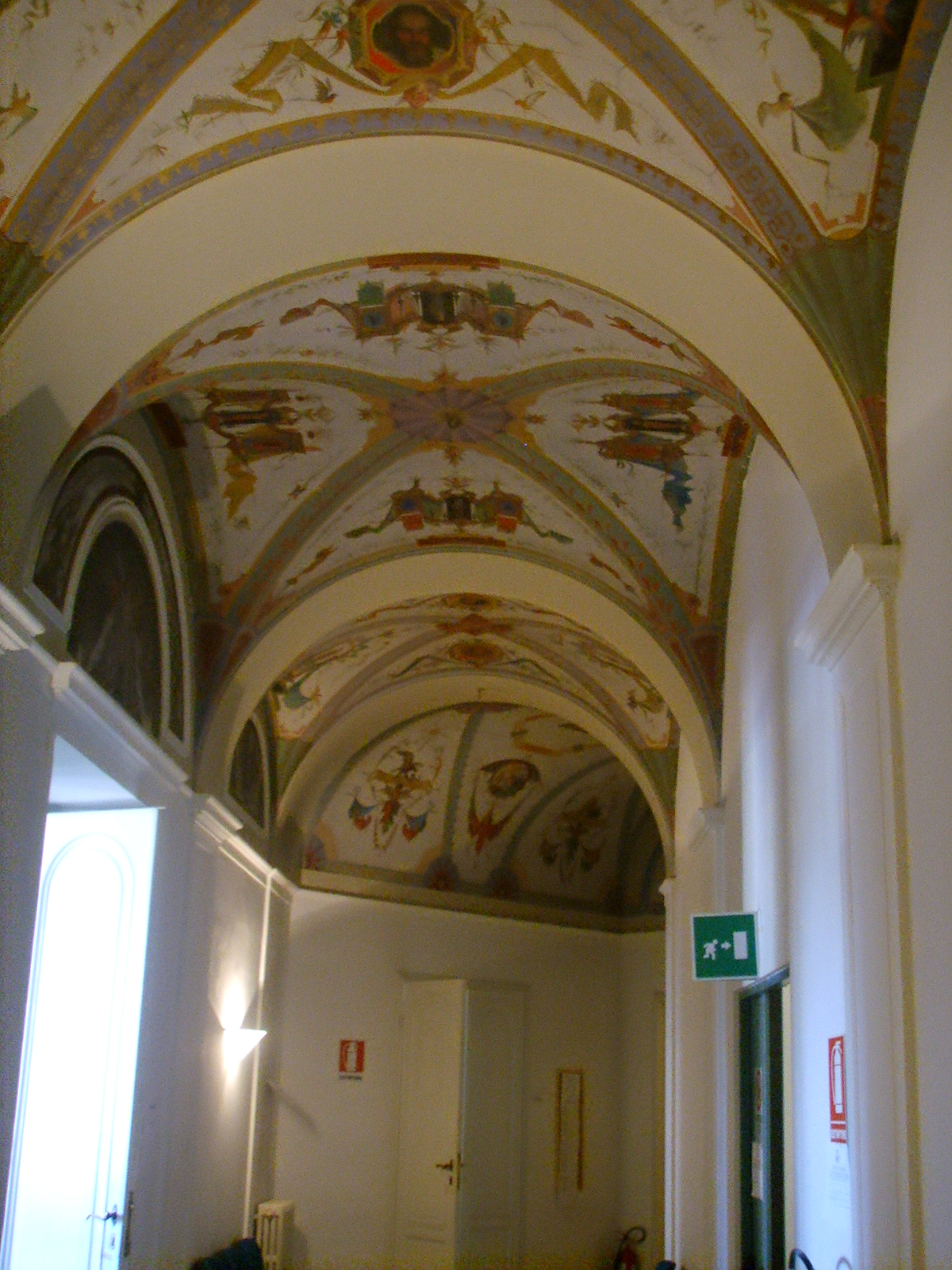 Dipartimento di italianistica, in Piazza Savonarola frescos